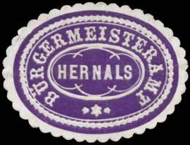 Sealing stamp Title: Bürgermeisteramt Hernals Description: violett, weiß, geprägt Place: Hernals size: 3x4 cm